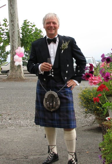 Paotred ivez a oar gwiskañ ur vrozh. Ur paotr gant loeroù gloan gwenn, deroù ar XXIañ kantved.